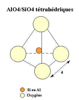 Structure des zéolites (AlO4 et SiO4 tétrahédriques)